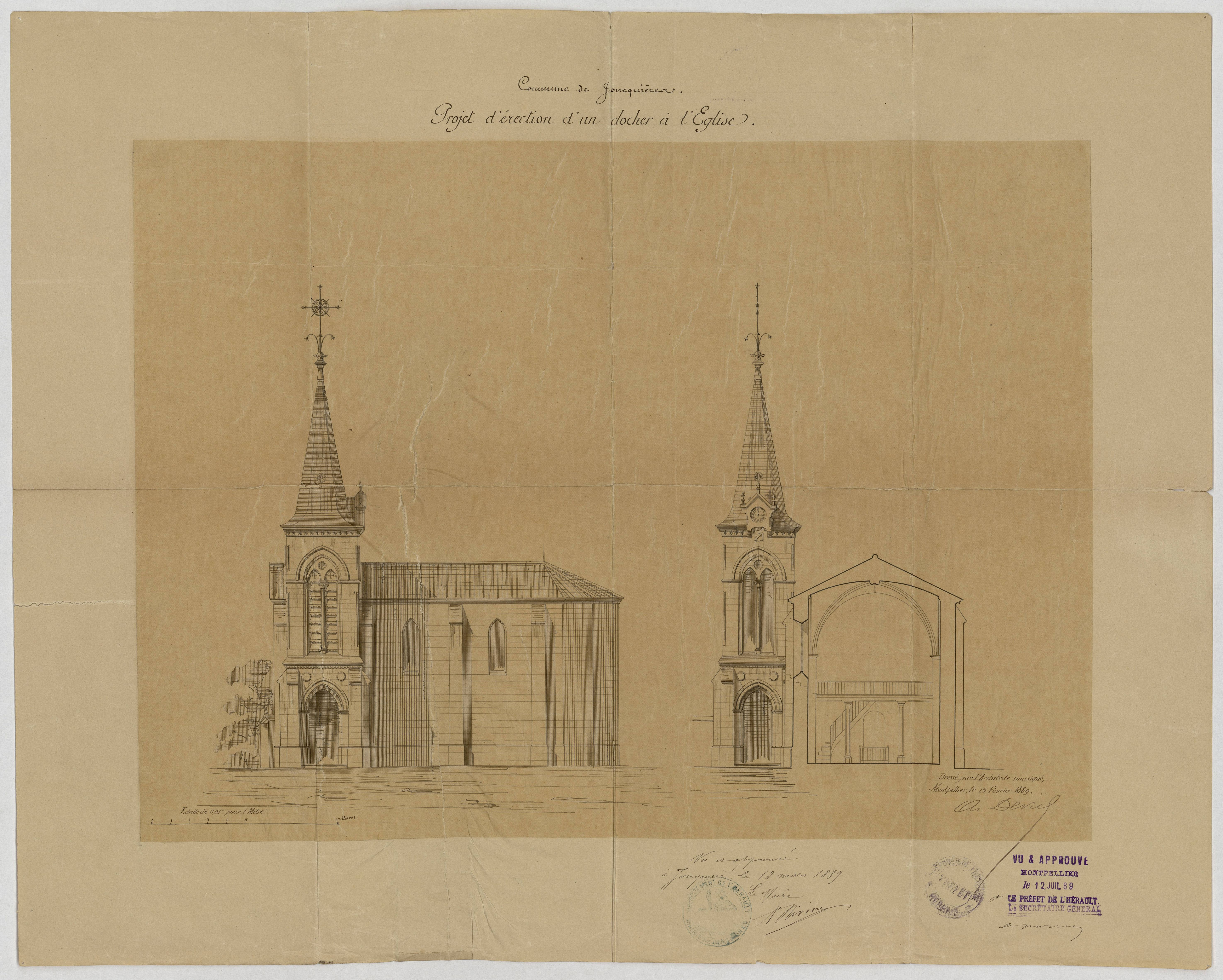 Jonquières. - Projet d'érection d'un clocher à l'église : plan